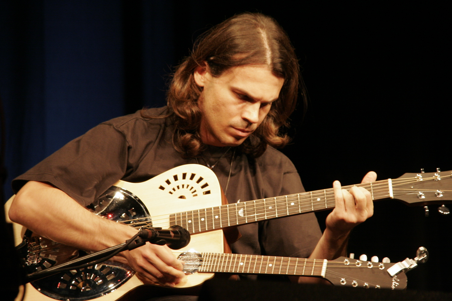 Attila Vural